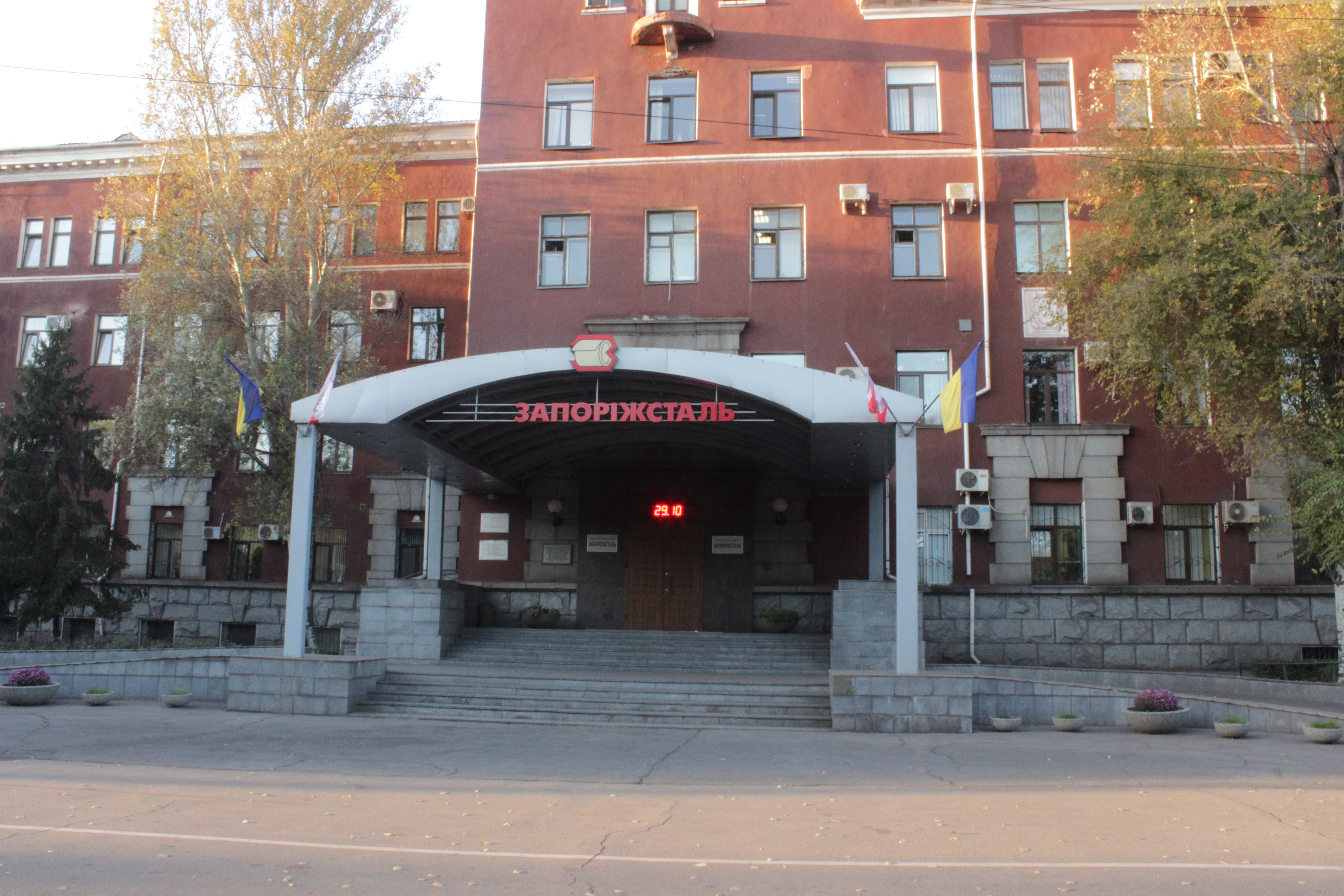 Будинок заводоуправління заводу "Запоріжсталь", в якому перебував Орджонікідзе Г. К. та працював Кузьмін А. М., Запоріжжя, Південне шосе, 72